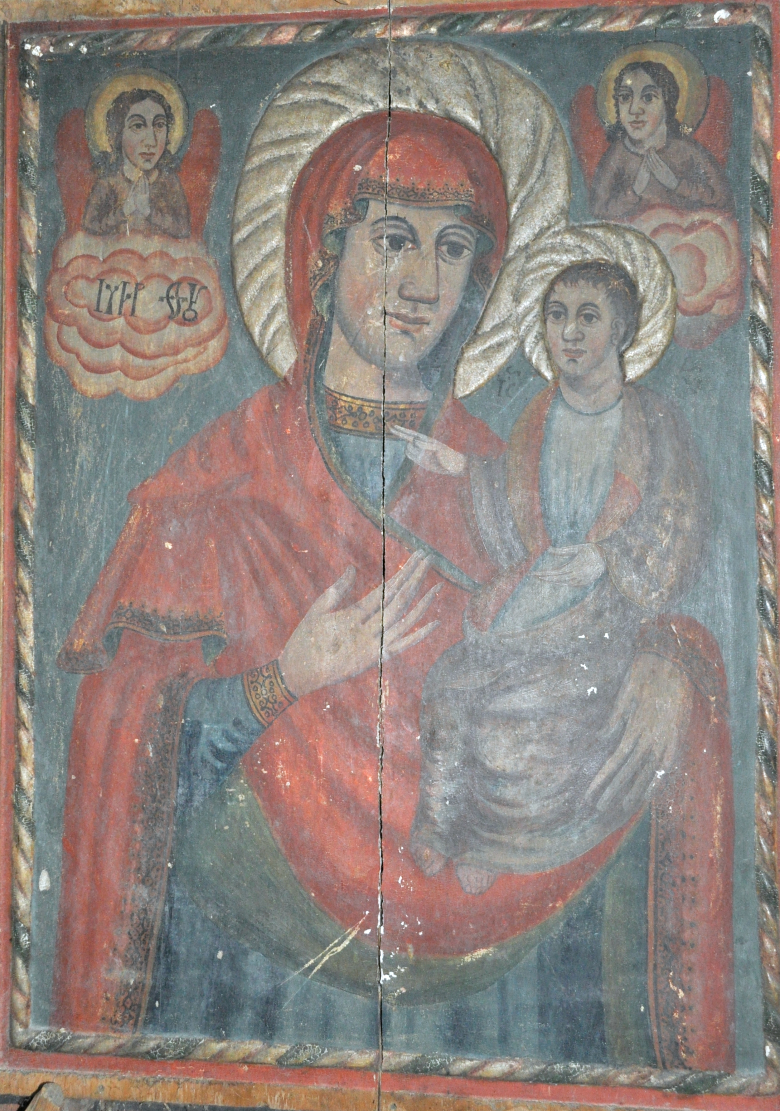 Biserica de lemn din Gârbău Dejului